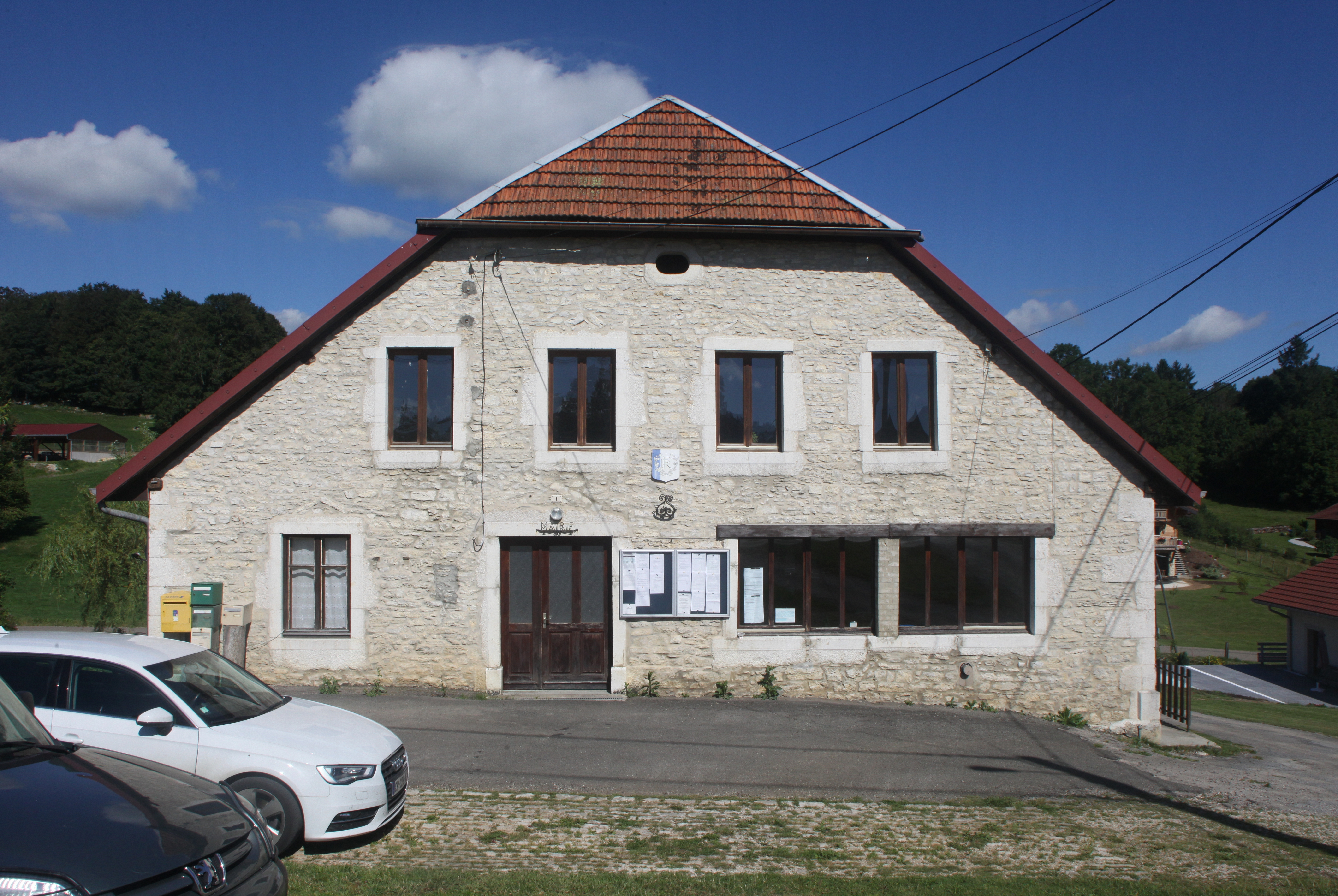 Mairie de Montflovin (Doubs).